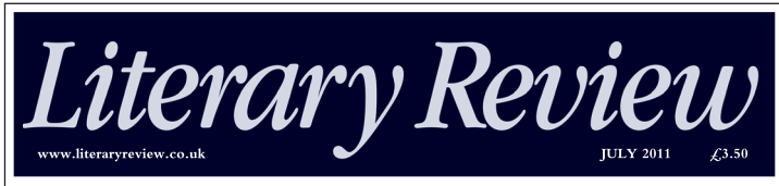 Logo von Literary Review (Ausgabe Juli 2011)